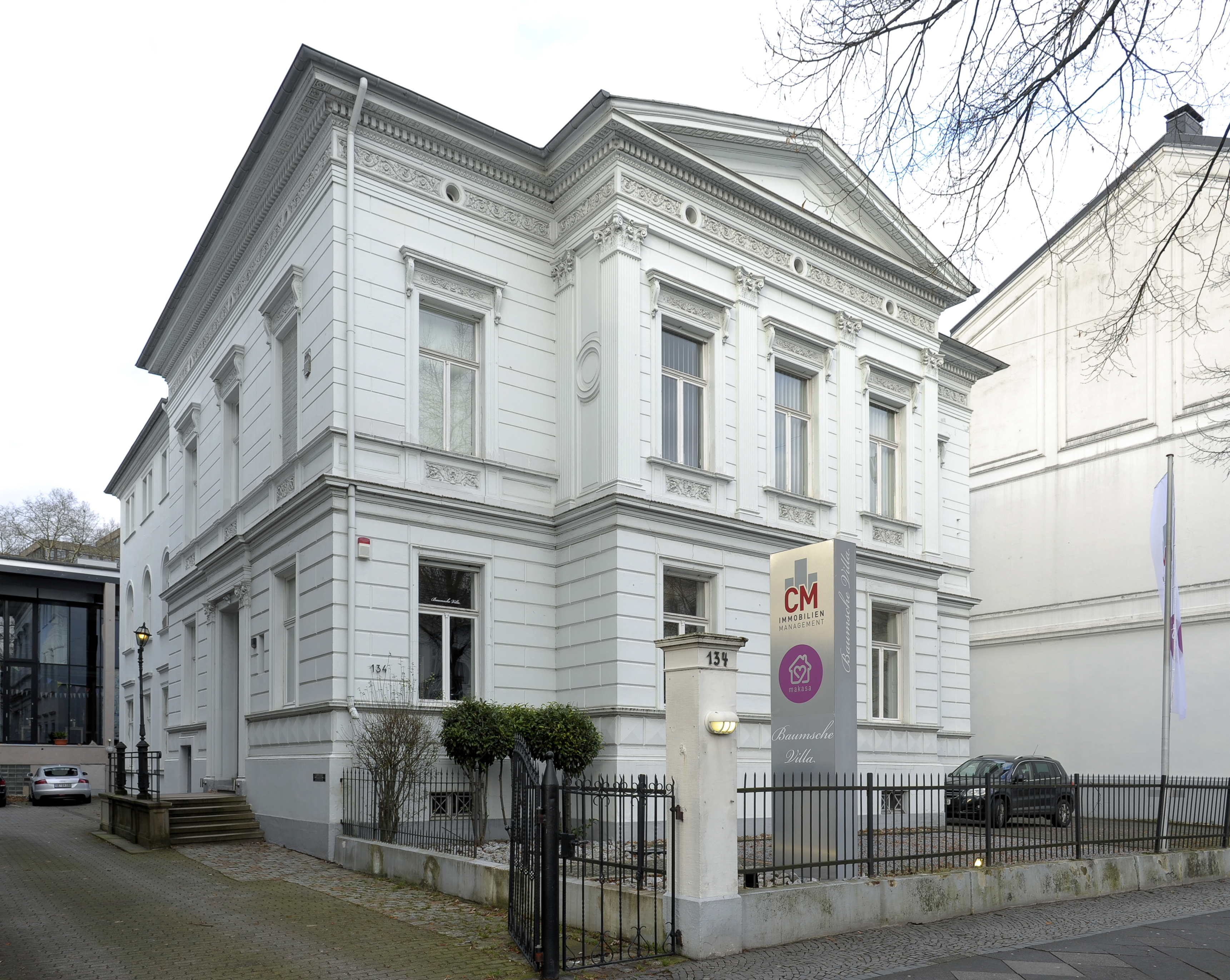 Baumsche Villa Wuppertal